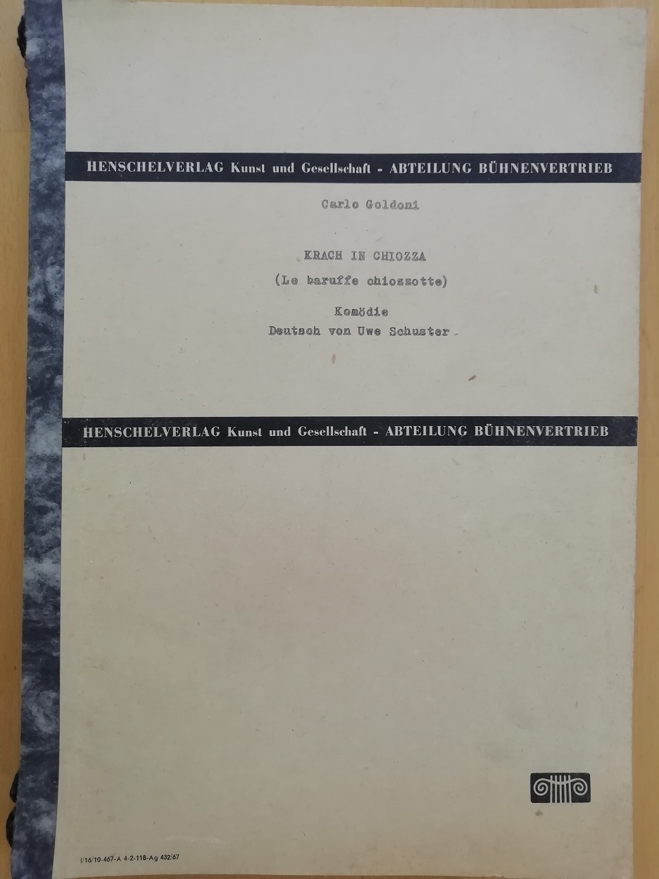 Titelblatt des Textbuches des Theaterstücks "Krach in Chiozza" in der deutschen Übersetzung von Uwe Schuster, erschienen im Henschelverlag, Berlin 1967